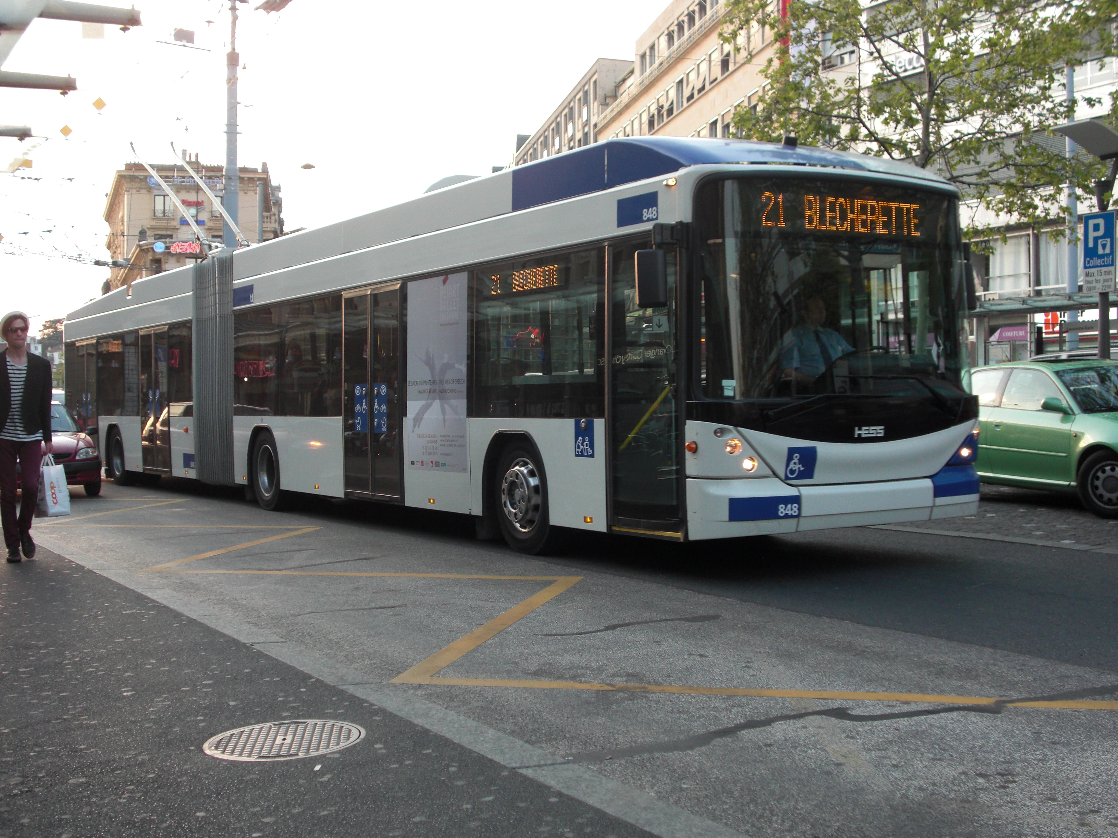 Trolleybus sur la ligne 21 à destination de "Blecherette".